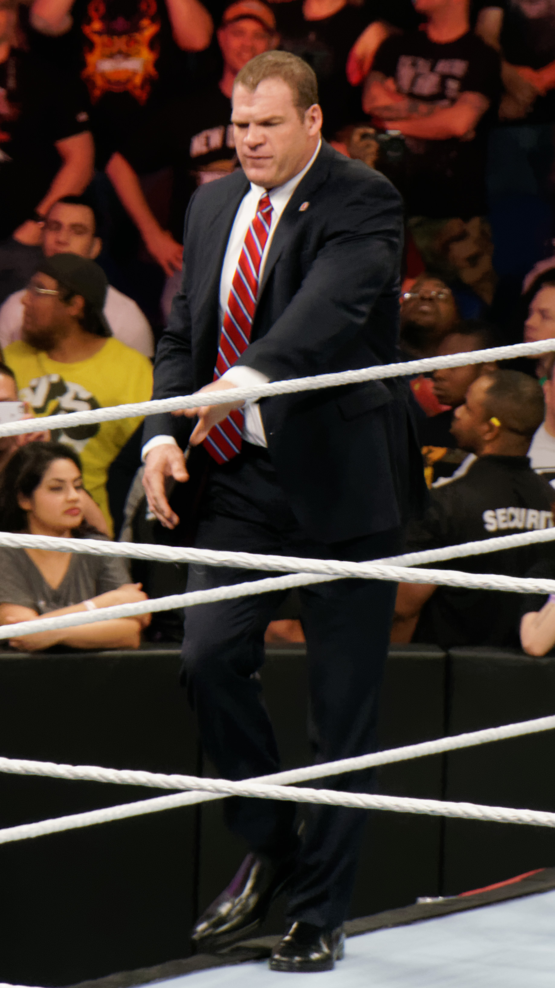 WWE Superstars Kane